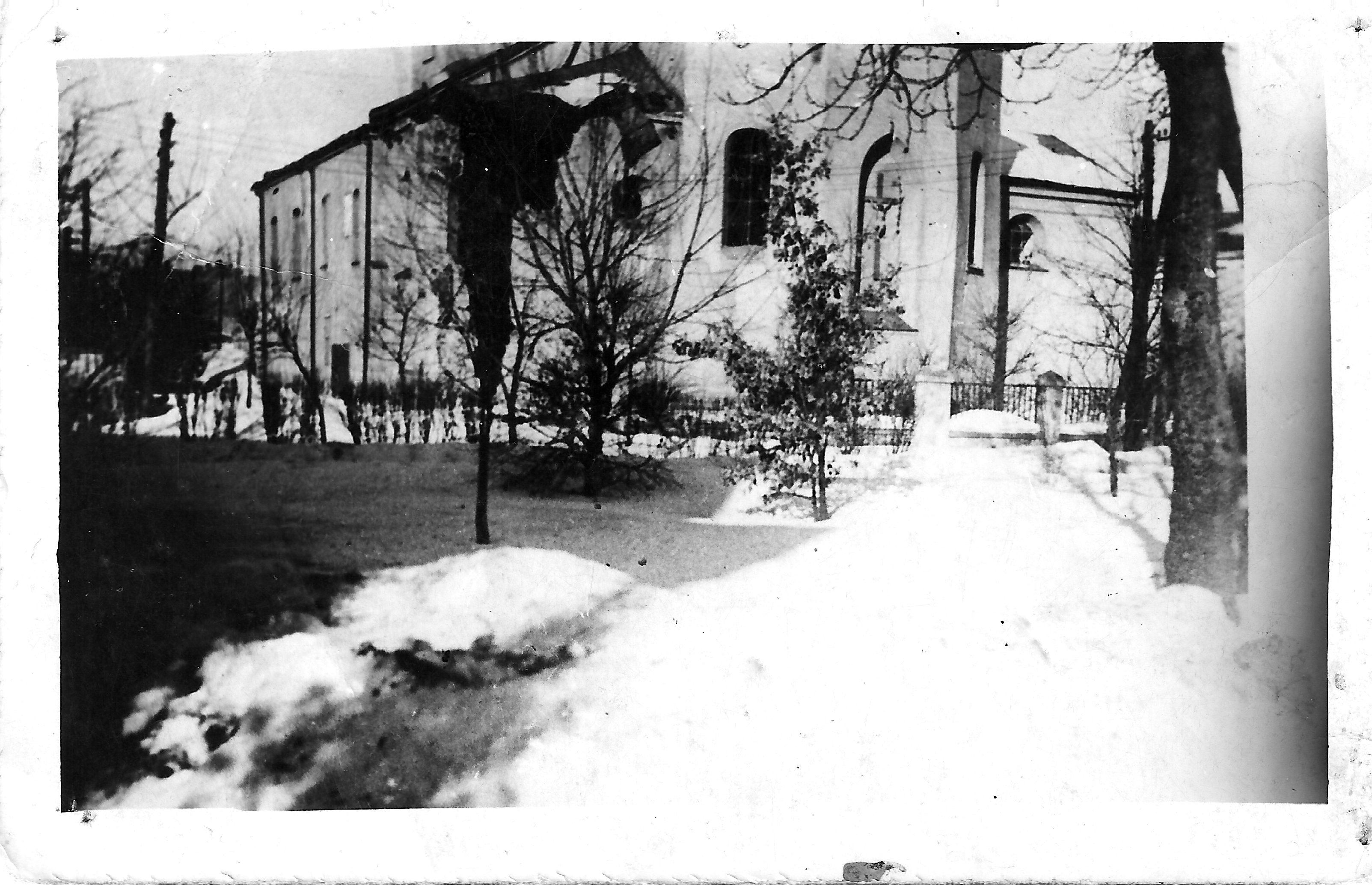 Wieluń, kościół św. Michała po zbombardowaniu widok od parku